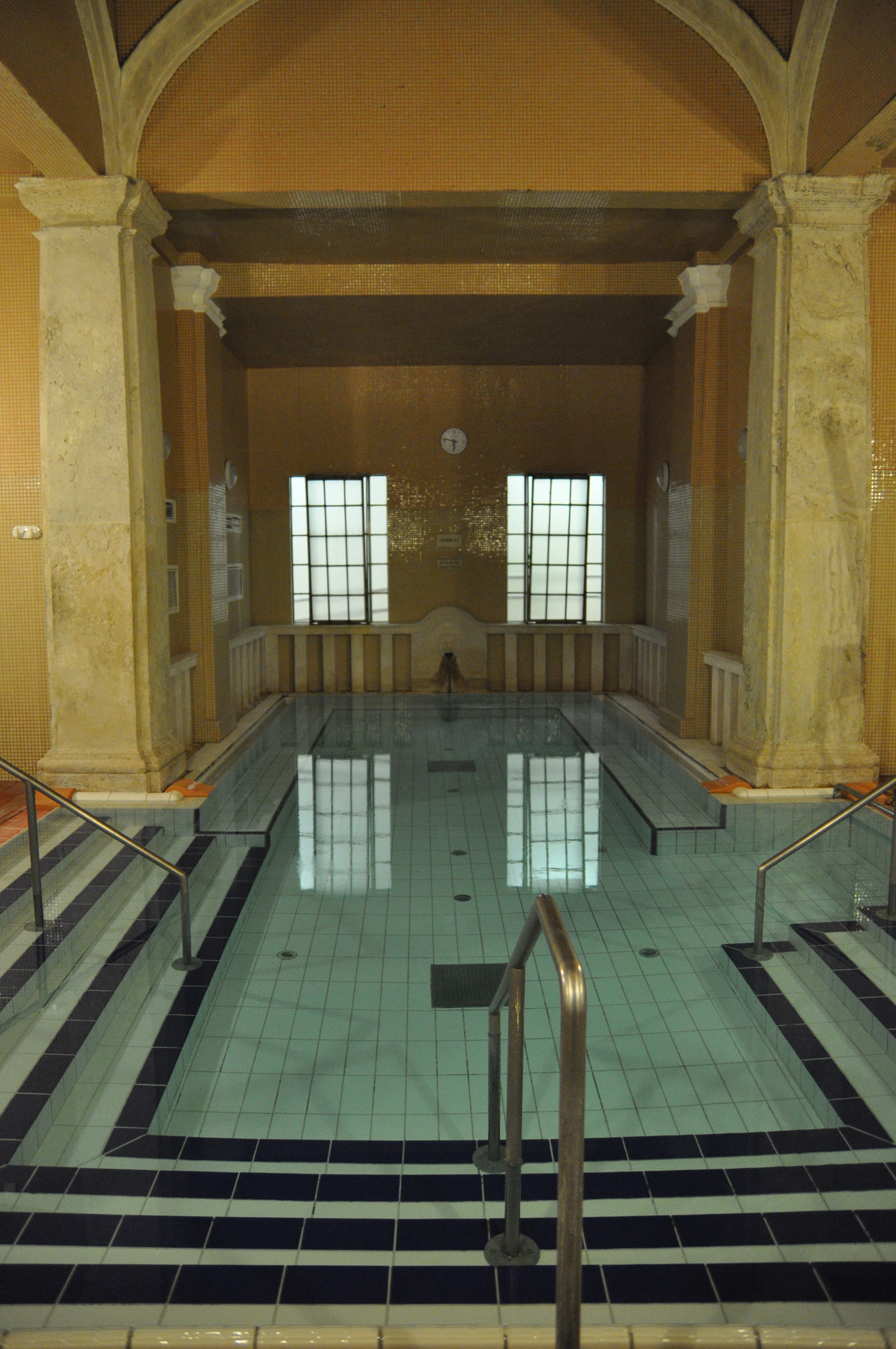 Budapest, Lukács fürdő, termál részleg, 32 °C fokos medence